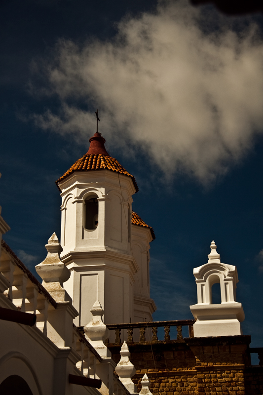 Templo de San Felipe Neri This medium shows the protected monument with the number H/00-015 in Bolivia.